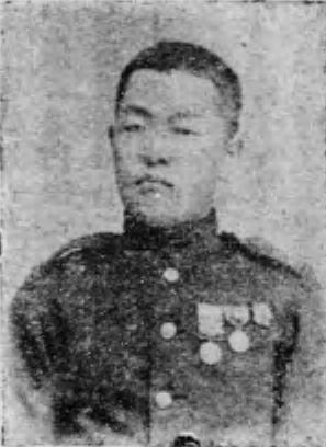 Bunzaburo Ichise